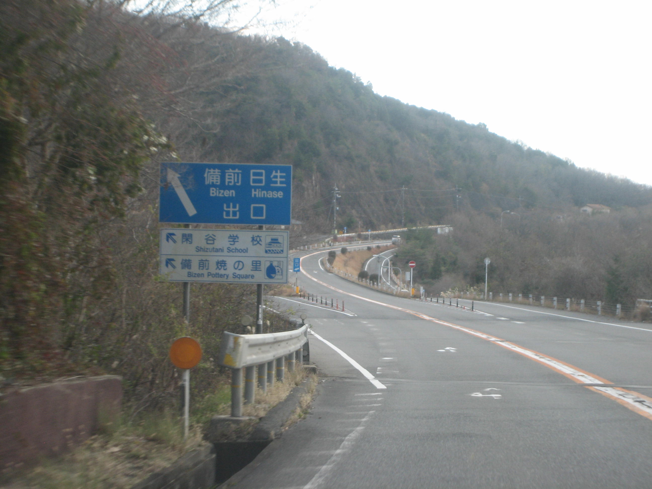 備前IC出口